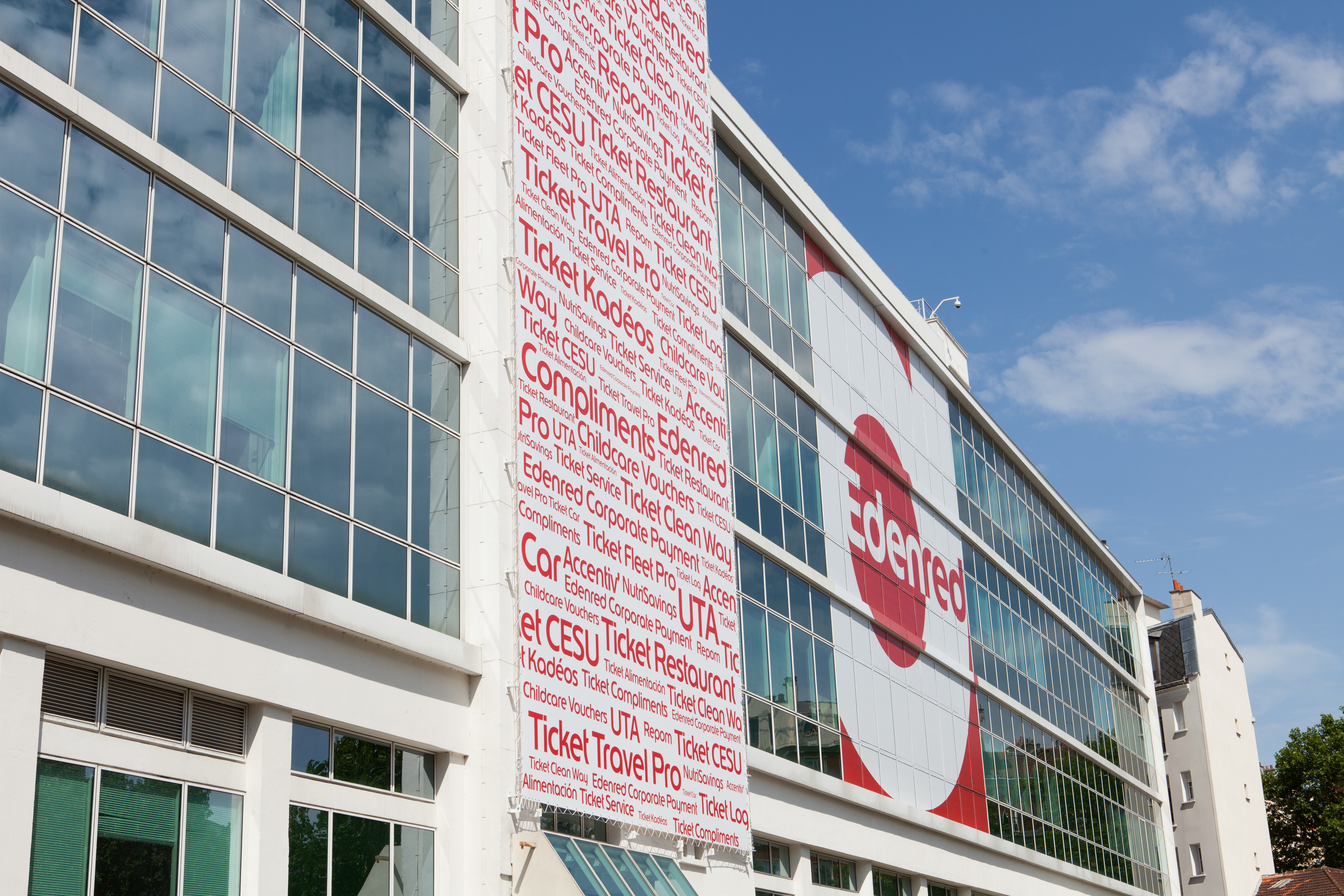 Siège d'Edenred à Malakoff